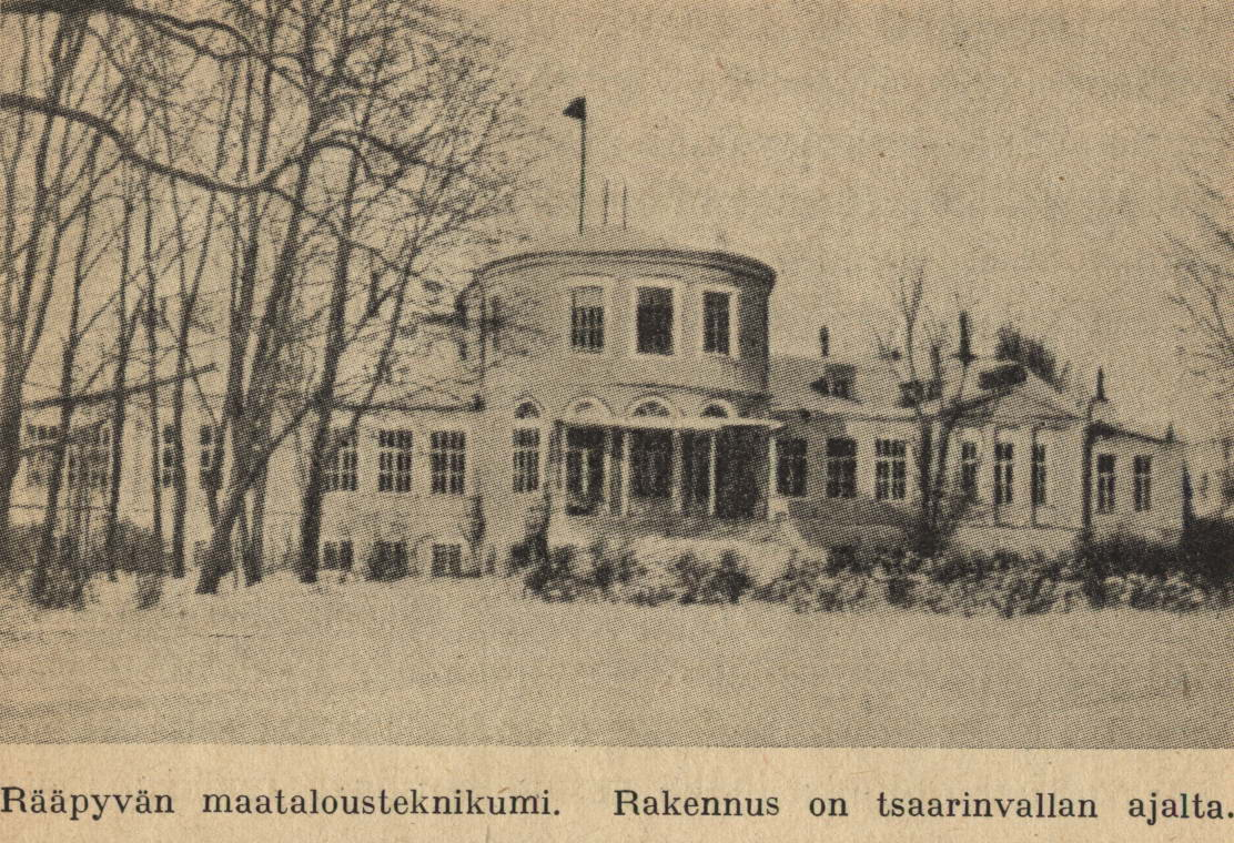 Рябовский сельхозтехникум. Постройка царских времён